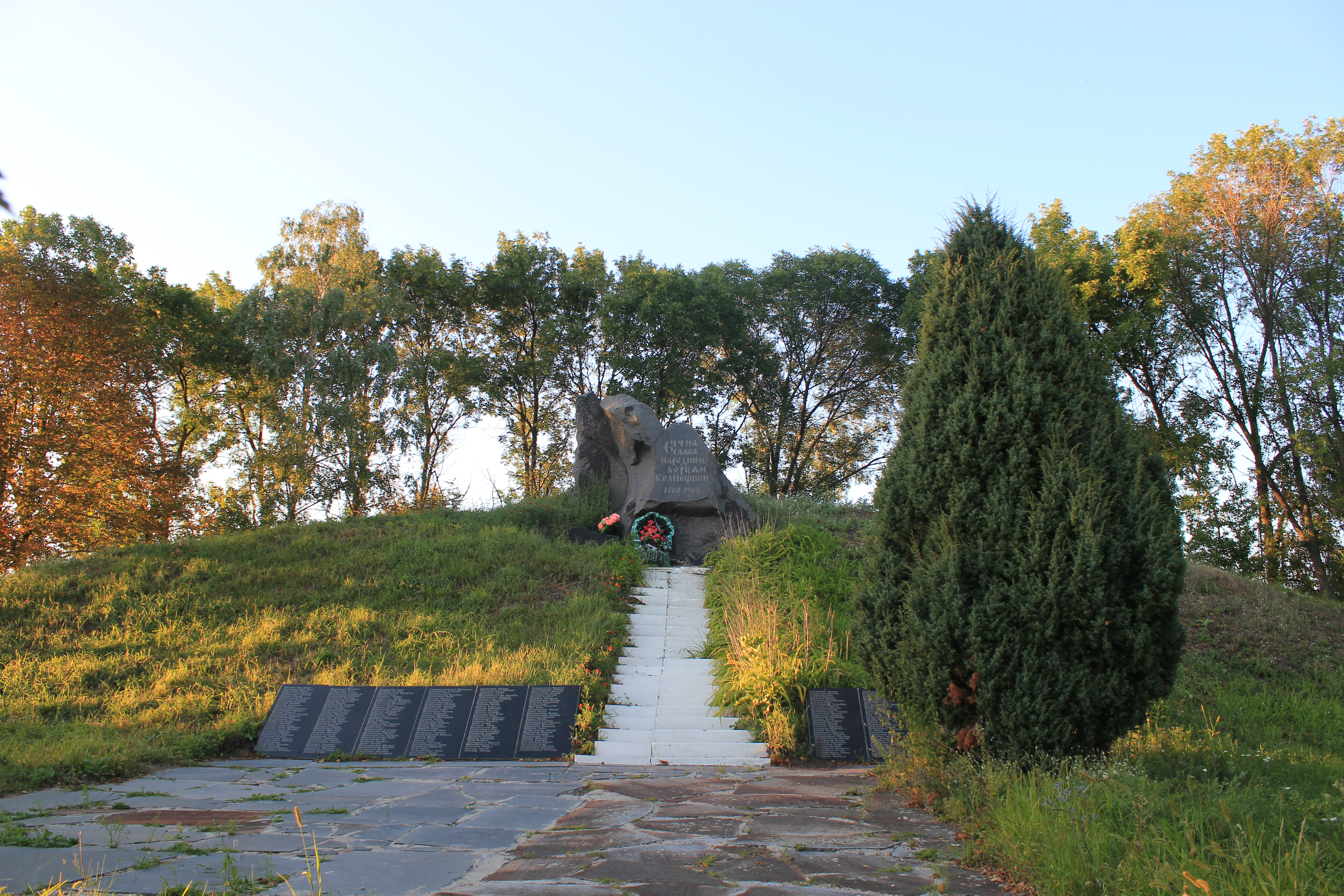 Братська могила учасників гайдамацького повстання «Коліївщина», с. Кодня, на схід від села